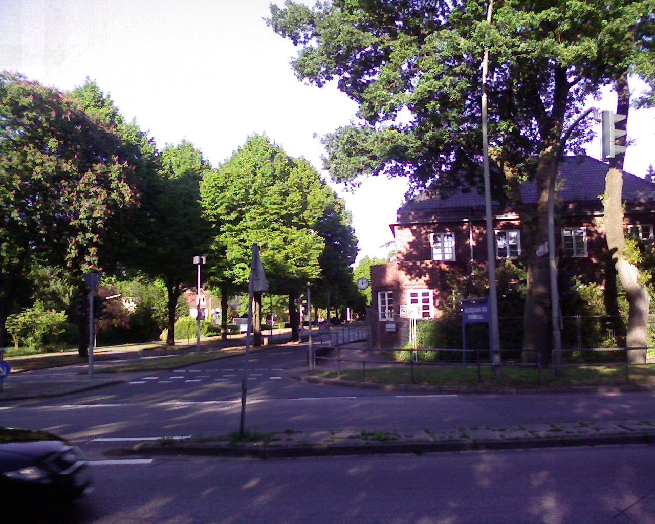 Westlicher Eingang des ehemaligen Allgmeinen Krankenhauses Ochsenzoll in Langenhorn, heute Teil des Asklepios-Klinikums Nord. Seit 19. Oktober 2010 Henny-Schütz-Allee